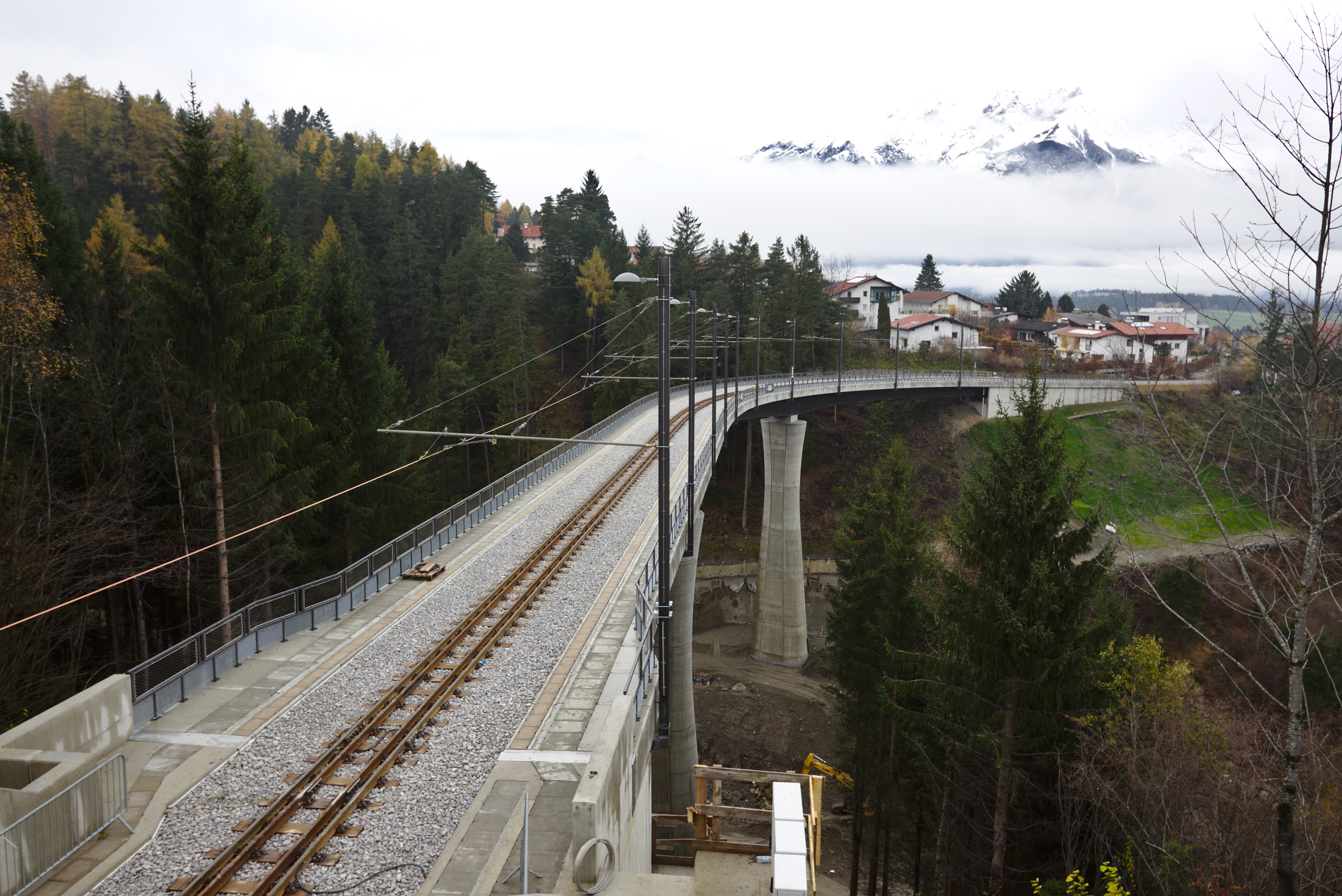 Blick gegen Norden auf die neuen Mutterer Brücke auf der Überführung stehend.